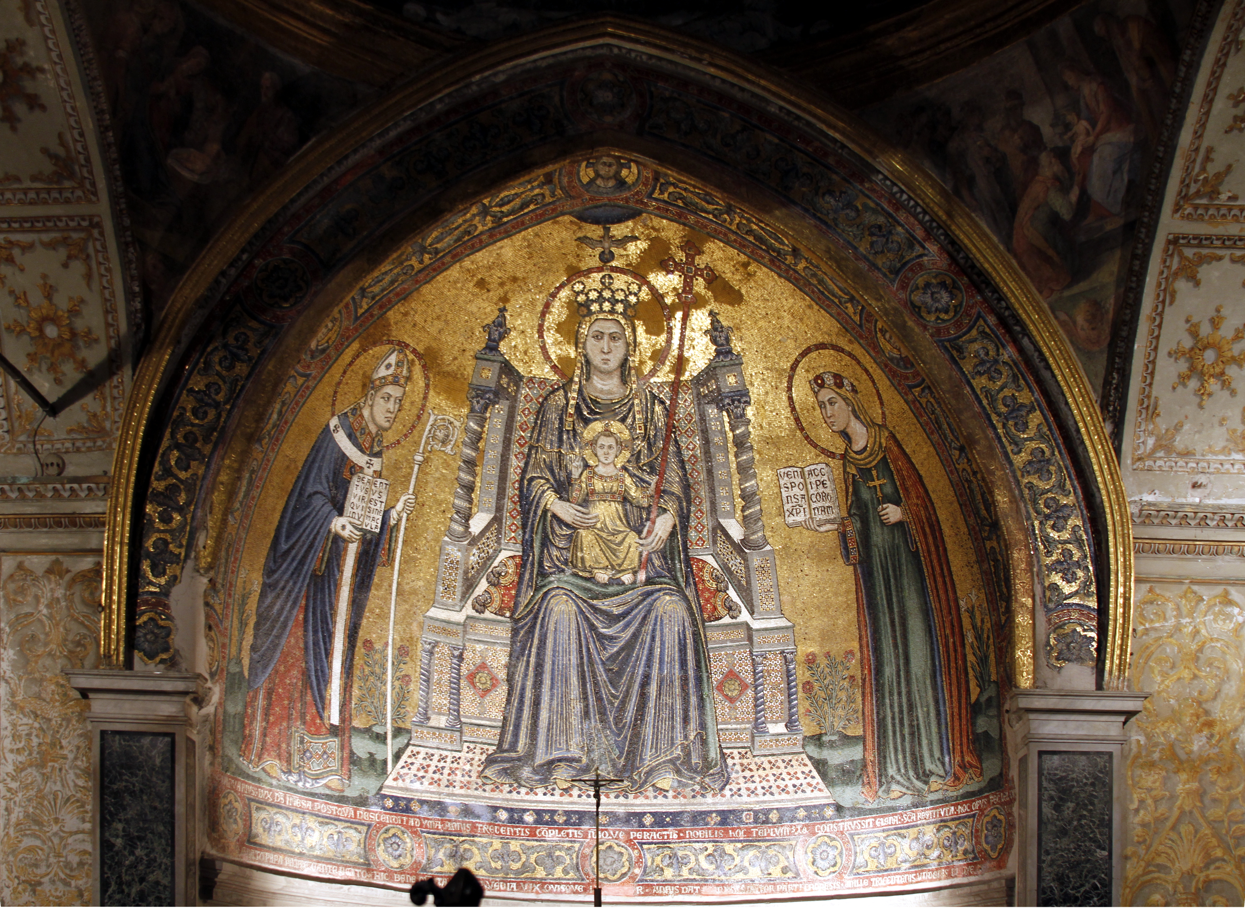 Cappella di Santa Restituta, Catedral de Nápoles